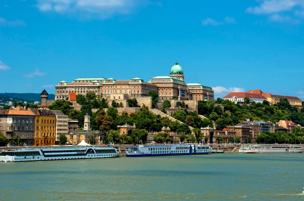 Kabinenfahrgstschiff Bolero vor dem Burgpalast in Budapest